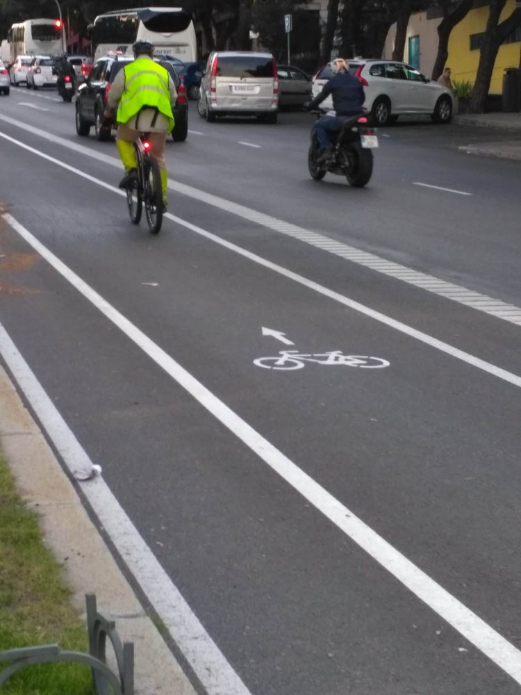 El próximo domingo 25 de junio, la ciudad celebrará la puesta en marcha de los nuevos itinerarios ciclistas –32 kilómetros en total-, con un encuentro de usuarios de la bicicleta que alcanzarán la plaza de Oriente, desde distintos puntos de la ciudad a través de diez rutas. El itinerario principal Ciudad Lineal-Salamanca-Chamberí-Moncloa cuenta con la participación de dos personalidades del ciclismo, Luis Pasamontes y Sol Otero. Todas las rutas finalizarán en la plaza donde los concejales de Desarrollo Urbano Sostenible, José Manuel Calvo, y de Medio Ambiente y Movilidad, Inés Sabanés, recibirán a los participantes en esta iniciativa que integra a los ciclistas en el tráfico urbano.